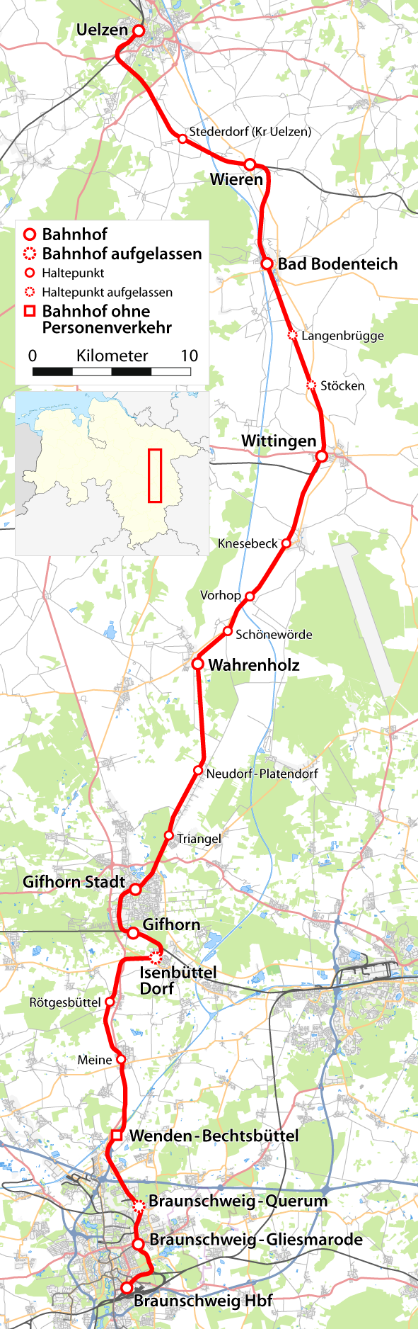 Karte der Bahnstrecke Uelzen - Braunschweig